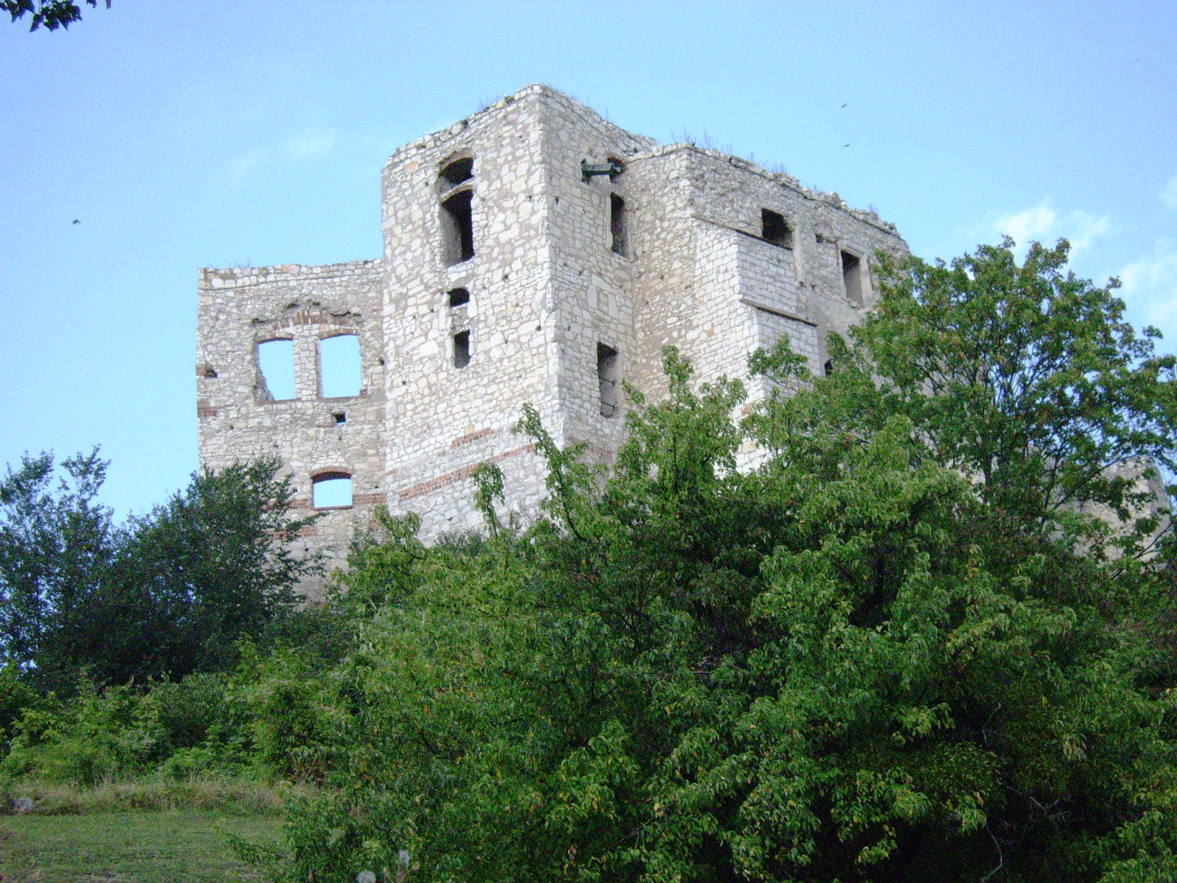 Kazimierz Dolny - zamek (zabytek nr rejestr. A/213)